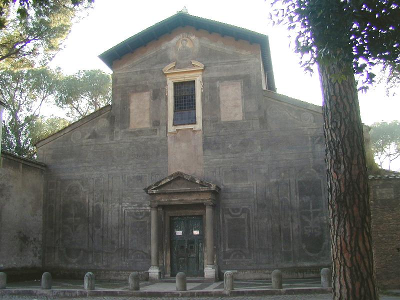 Roma, Santi Nereo e Achilleo a Caracalla